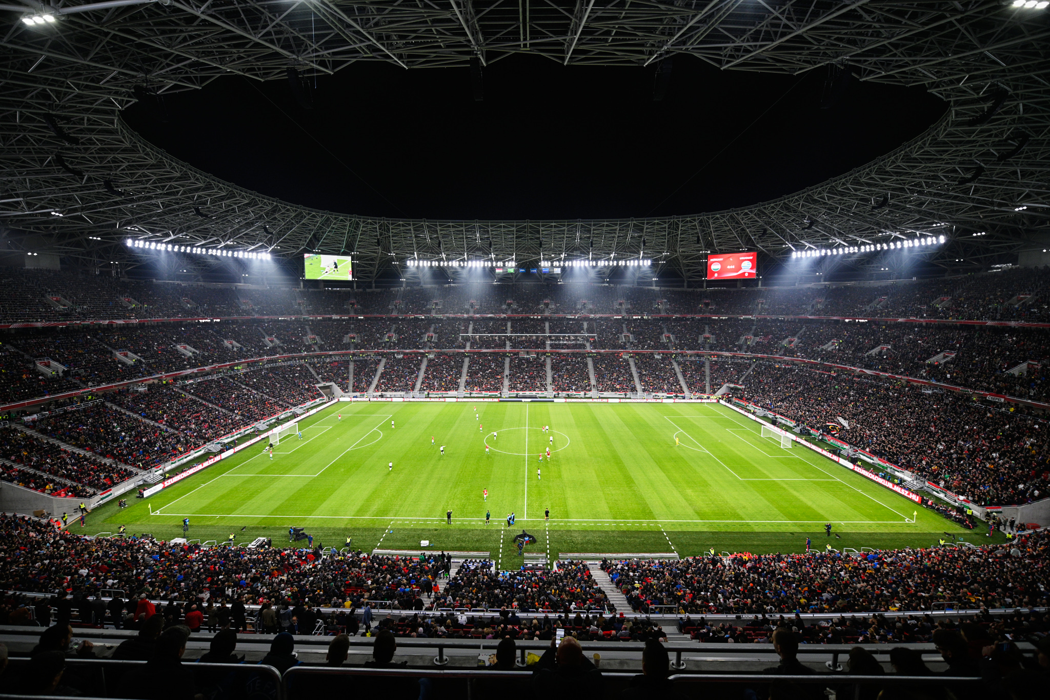 A Puskás Aréna a Magyarország-Uruguay labdarúgómérkőzésen